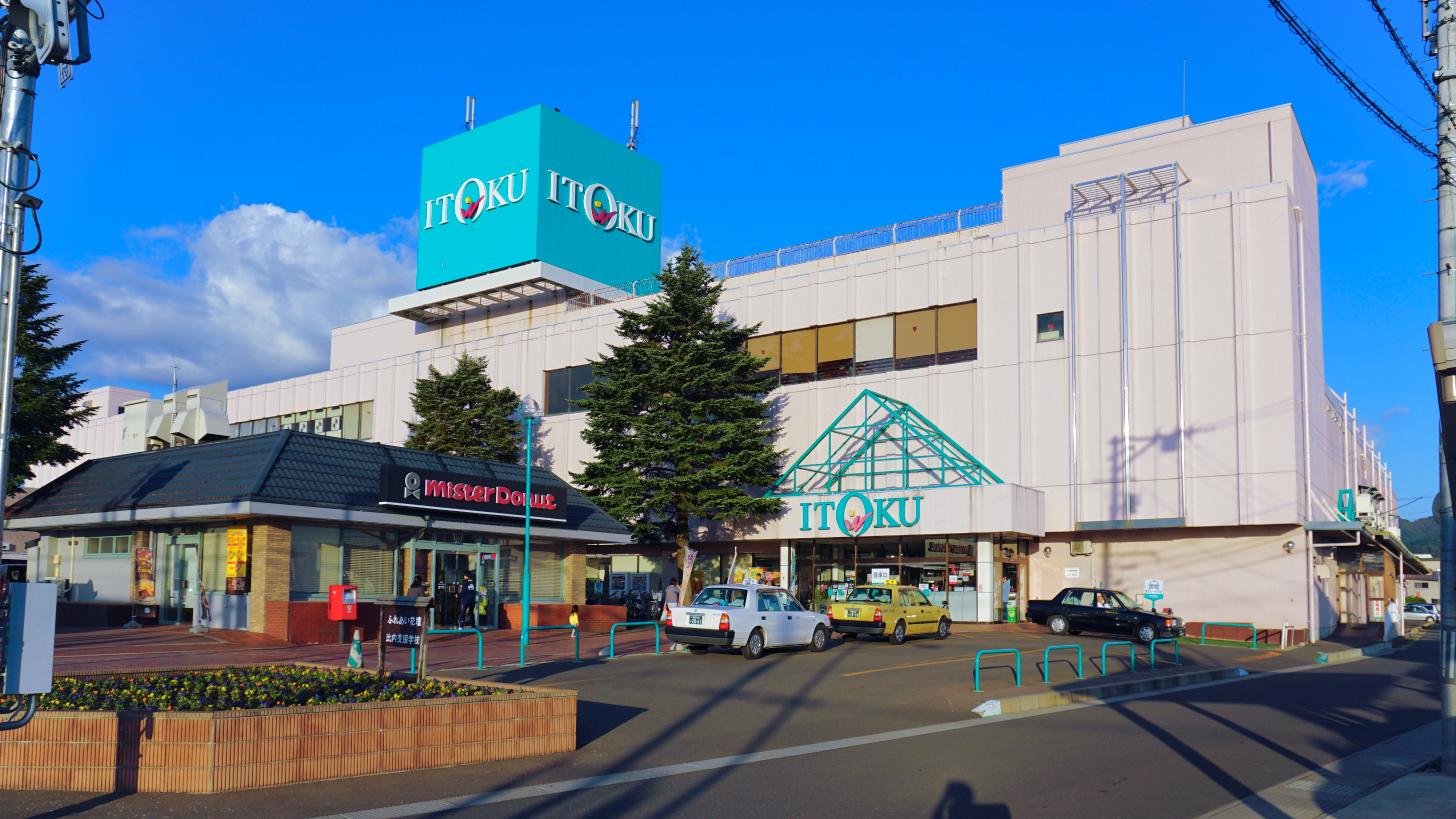 大館市中心部にあるいとく大館ショッピングセンター。いとくの旗艦店であり百貨店に類似したフロア構成となっている。